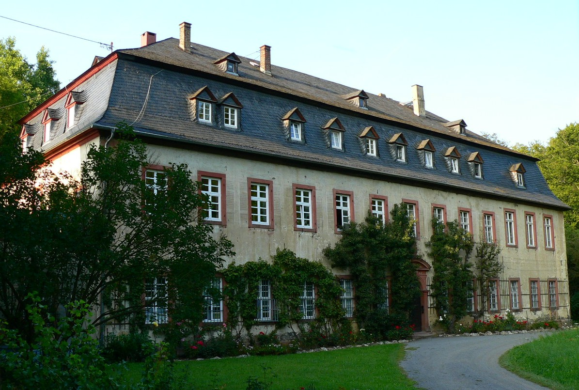 Küchenbau Kloster Arnsburg bei Lich, Hessen, Germany